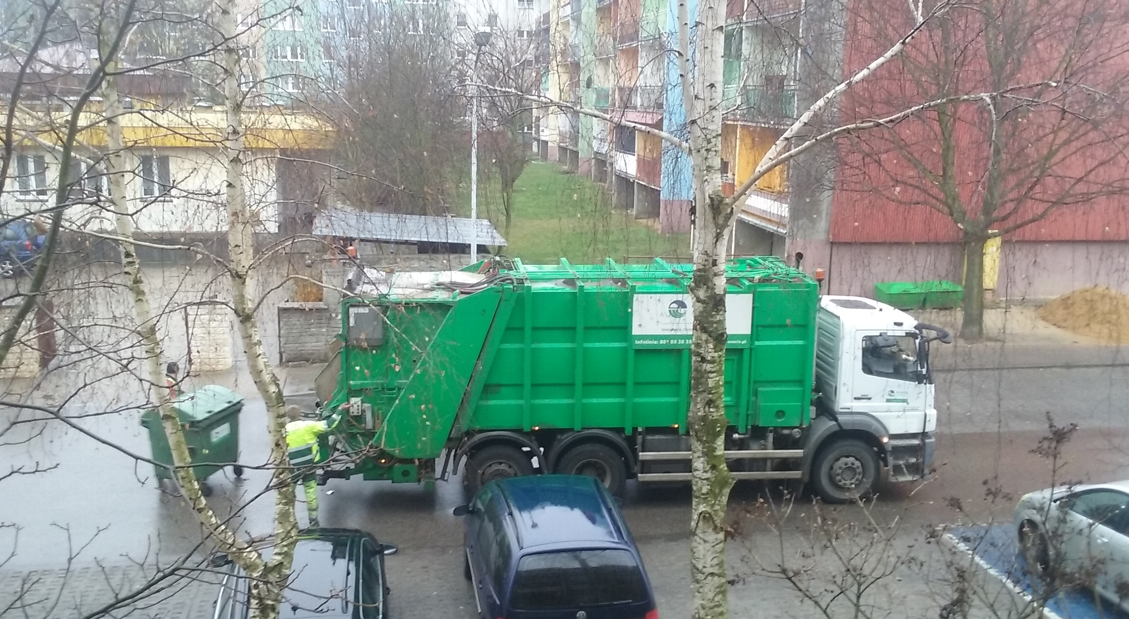 Pojazd specjalny odbierajacy odpady zmieszane w 60-tysięcznym Tomaszowie Mazowieckim, w województwie łódzkim